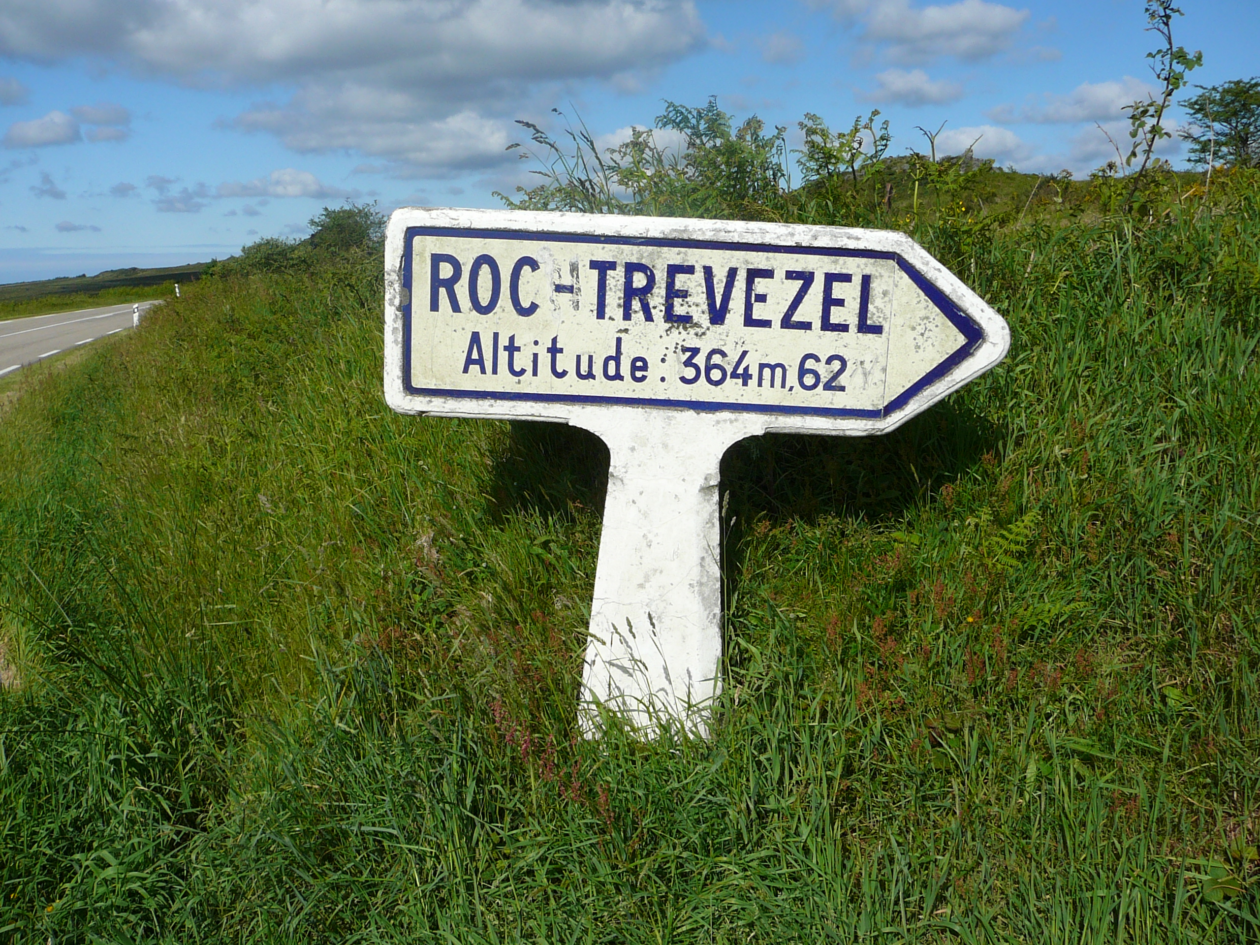 Les Monts d'Arrée sont si "hauts" qu'il ne faut pas oublier un seul centimètre!